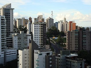 Prédios do bairro Luxemburgo